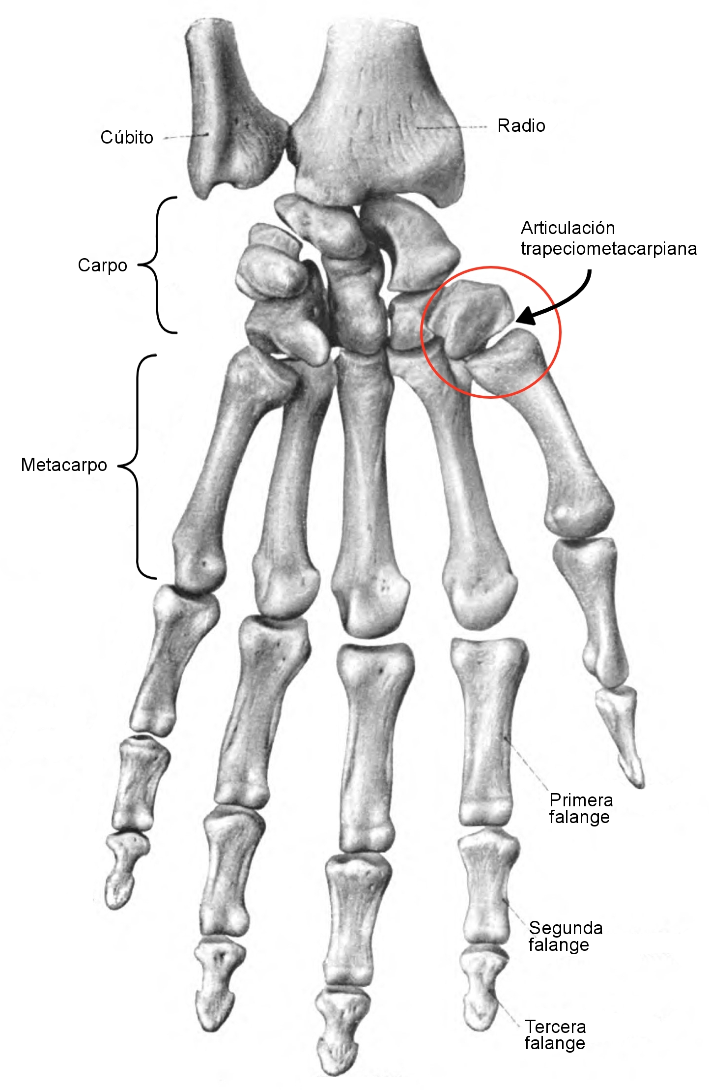 Huesos y articulaciones de la mano y muñeca izquierda humana. En rojo se señala la articulación trapeciometatarsiana.